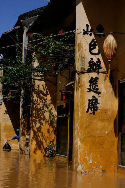 Ketsana 2009. ảnh bcnt tặng Hữu Nghị